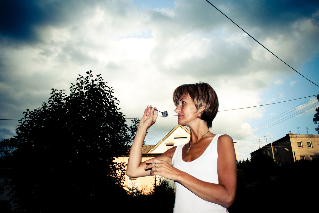 Darts